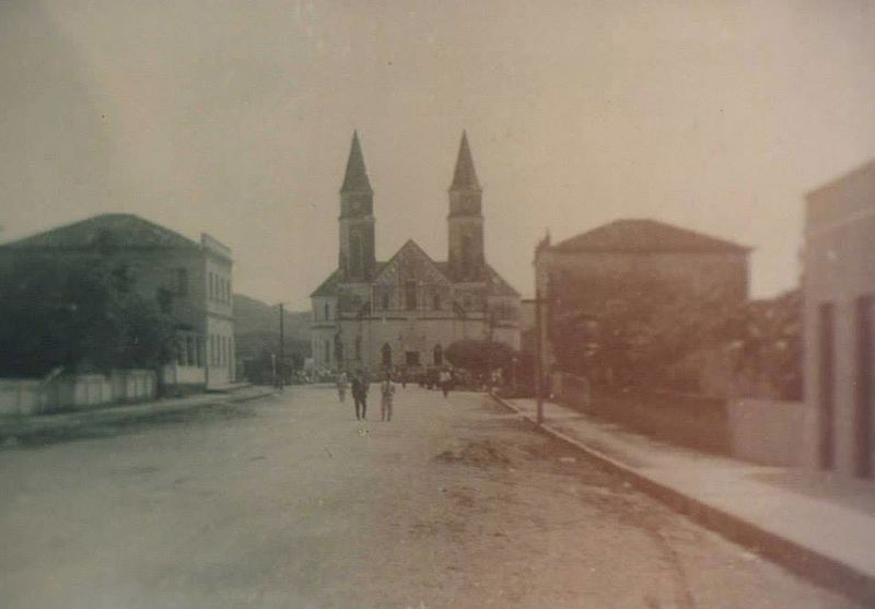 Igreja Nosso Senhor do BonFim já concluída, década de 1930